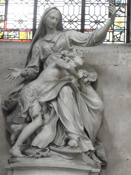 La Religion instruisant un indien par Nicolas-Sébastien Adam (église St-Paul St-Louis de Paris)